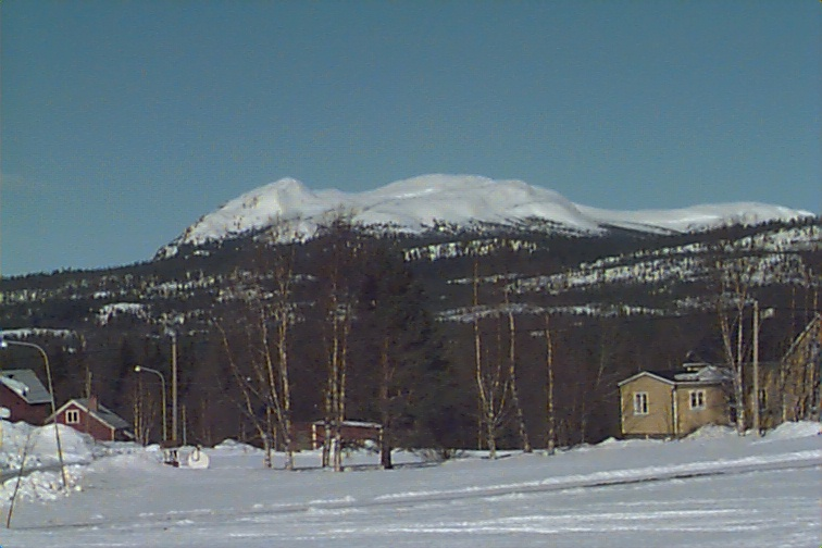 Oldklumpen, fotograferad på dagtid från Olden